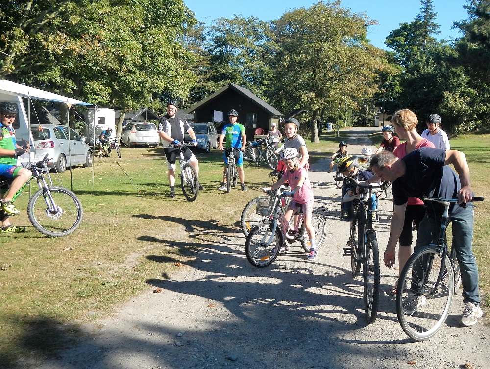 Thor motion og samvær Skelund Veddum på weekend på Samsø.